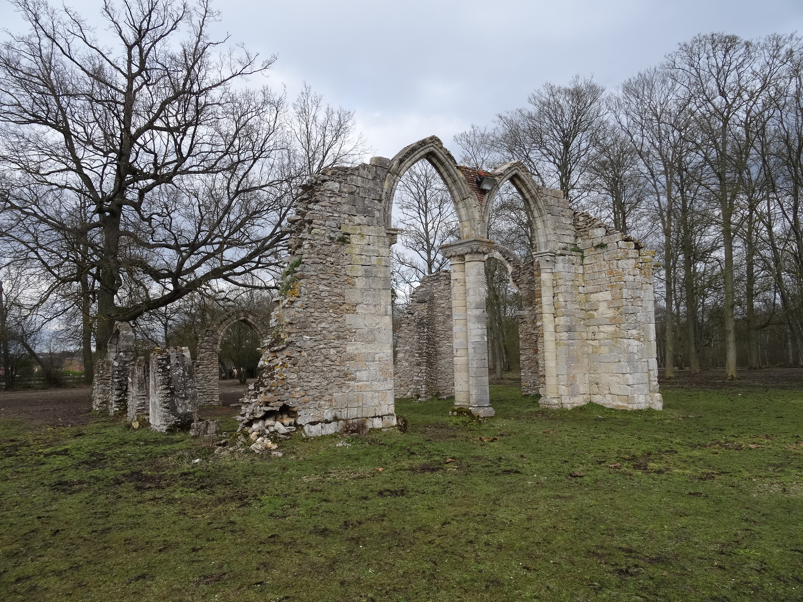 Vestiges de l'église Notre-Dame de Corbeil achetés par le comte de Goutaut-Biron en 1823 et exposés dans le parc du château de Montgermont. (Pringy, Seine-et-Marne, région Île-de-France).